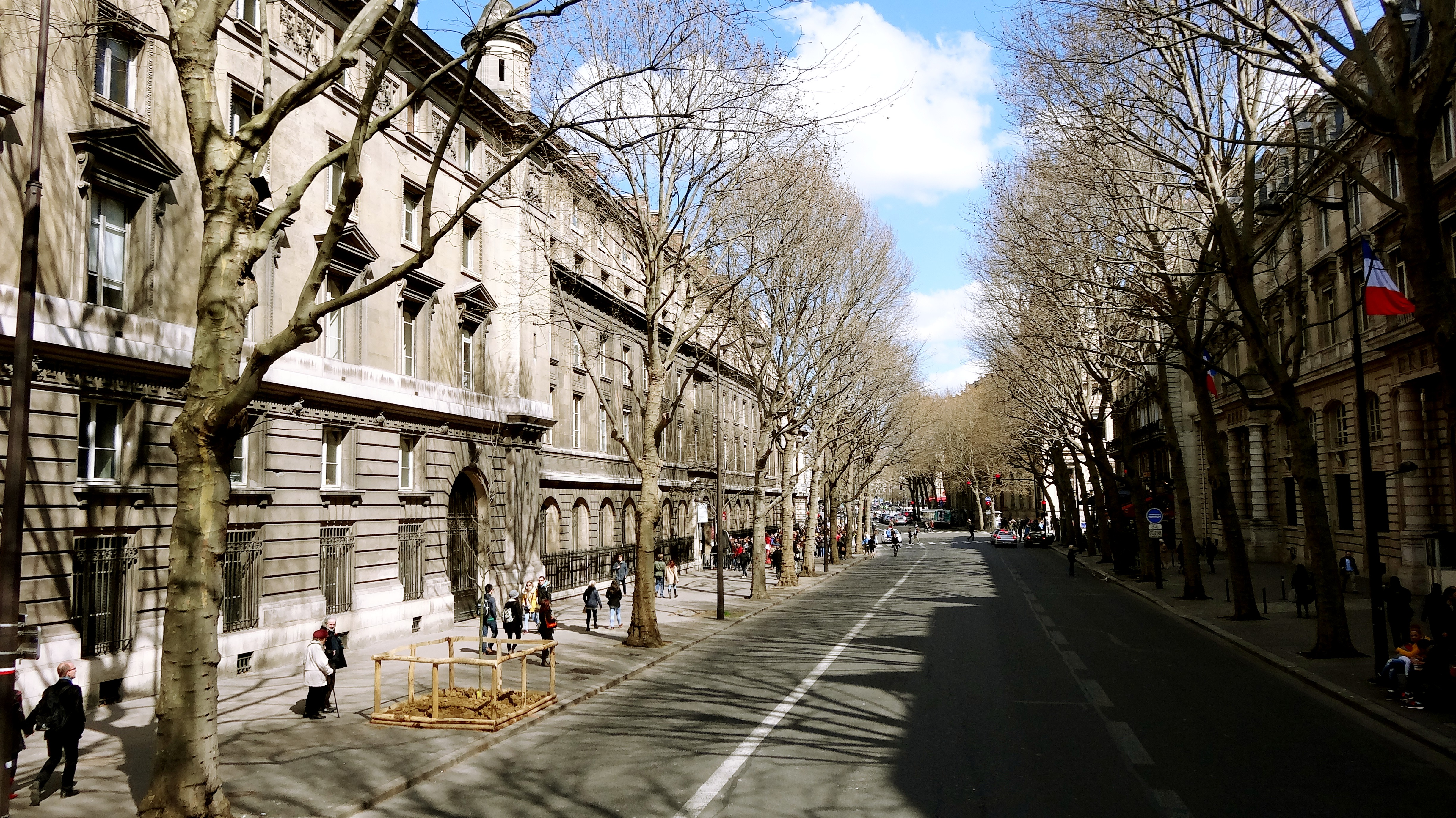 Boulevard du Palais, Paris, France